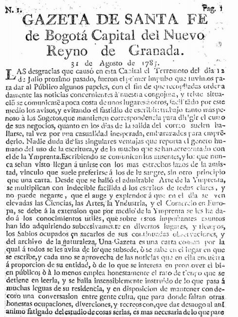 Première page du premier numéro de La Gazeta de Santa Fe